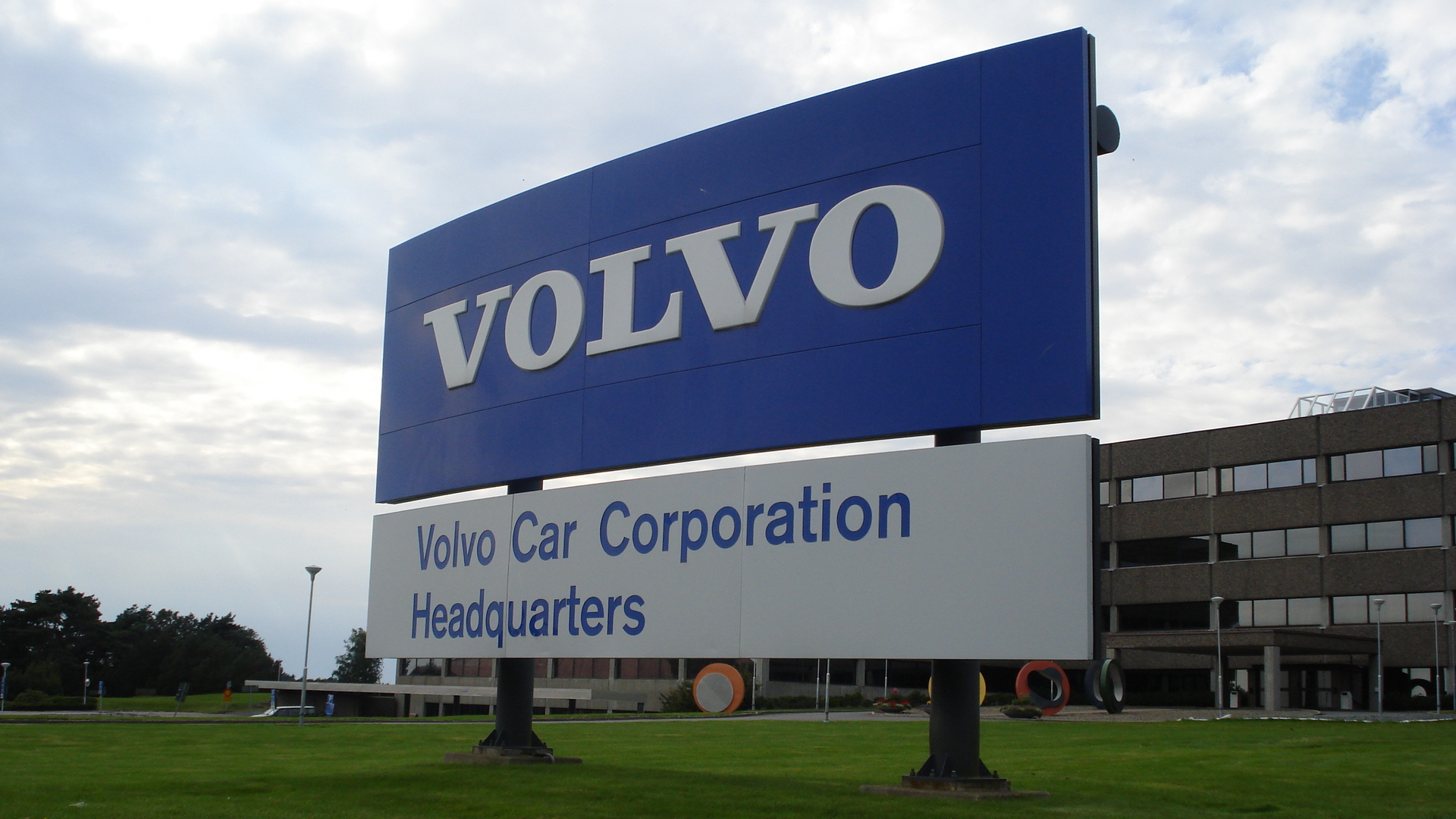 Volvo Headquarter Göteborg.